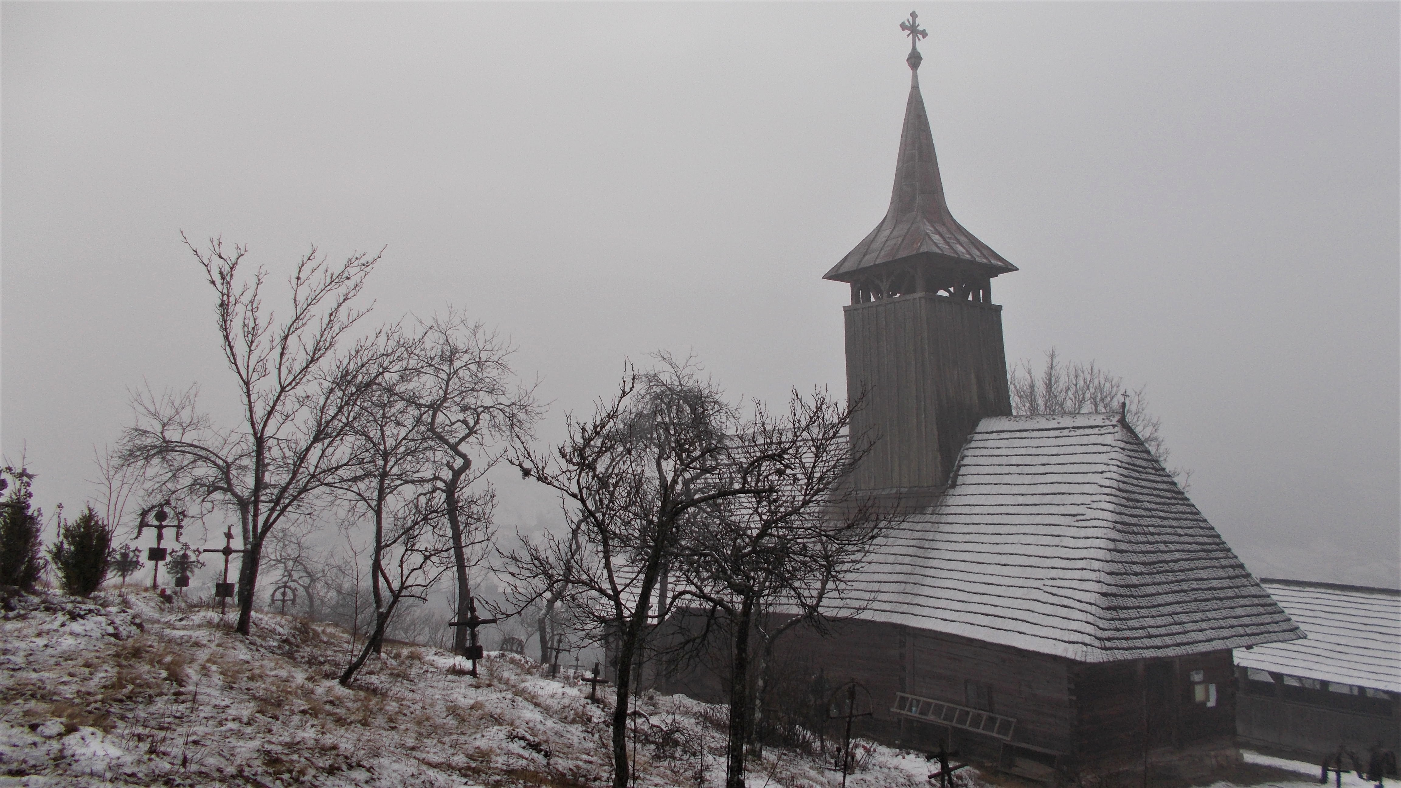 Biserica de lemn din Poiana Botizii, județul Maramureș